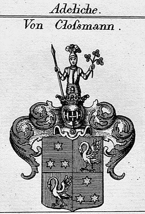 Wappen der pfalz-bayerischen bzw. badischen Adelsfamilie Cloßmann